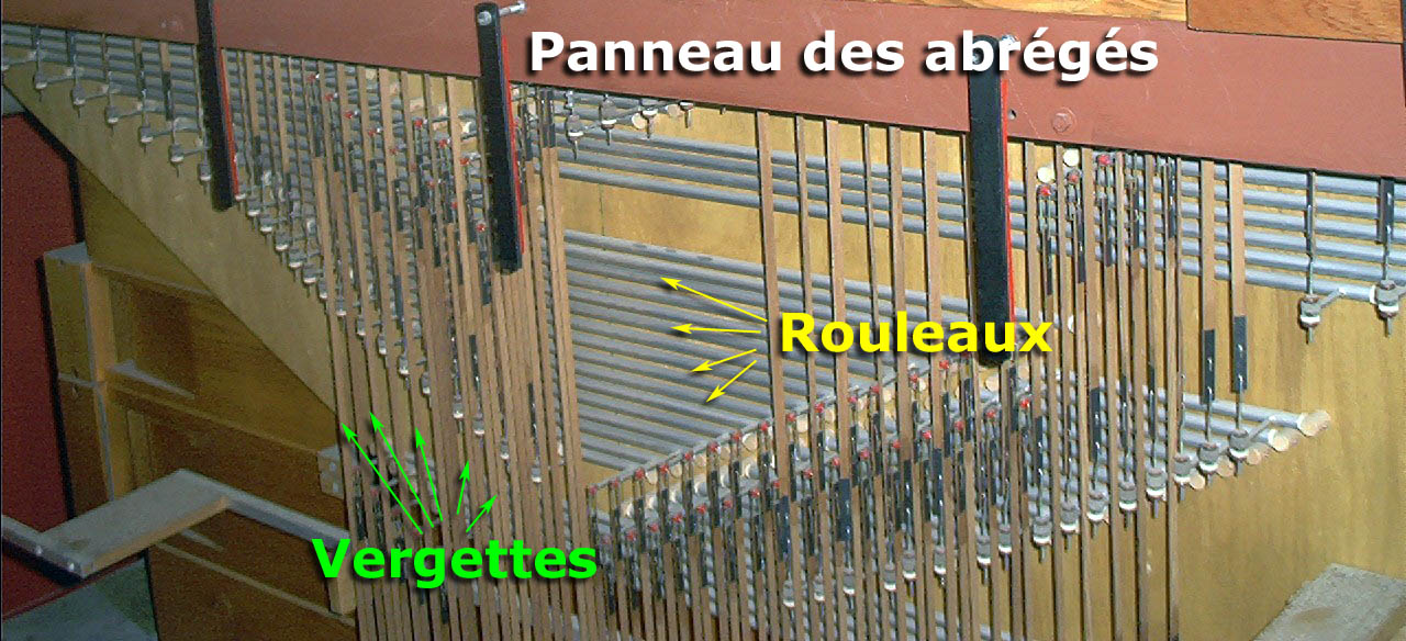 Panneau des abrégés d'un orgue avec légendes